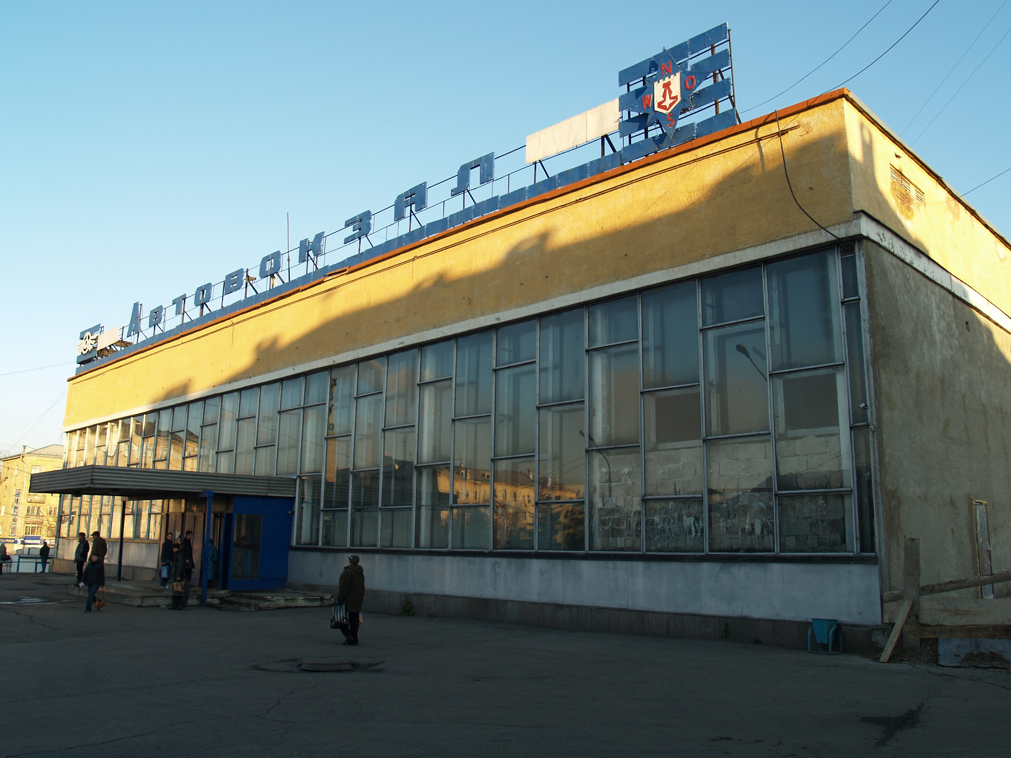 Автовокзал наши дни